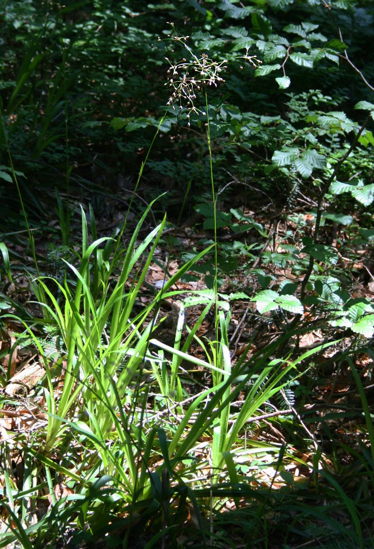 Wald-Hainsimse (Luzula sylvatica), Simsengewächse (Juncaceae) - Österreich/Austria/Autriche: Oberösterreich, Hausruckviertel, ca. 2.7 km NE Forsthaus Redltal, ca. 680 m s.m.